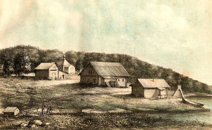 Исаково.